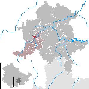 Sitzendorf in Thuringia - District Saalfeld-Rudolstadt